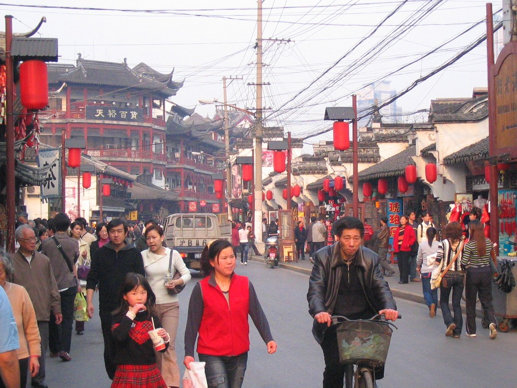 Essa é a única região da cidade em que vi uma arquitetura mais "chinesa".Shanghai Old Street